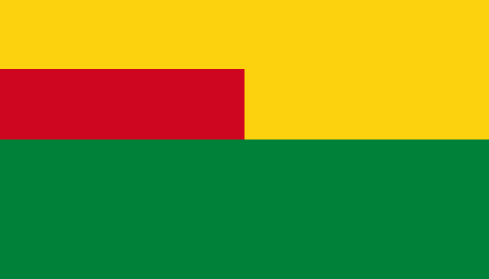 Bandera de Camilo Ponce Enríquez